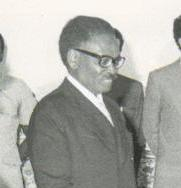 Ambasador Polski w Angoli, gen. dyw. Roman Paszkowski z małżonką Aleksandrą (z prawej) składają życzenia noworoczne Prezydentowi Ludowej Republiki Angoli, Agostinho Neto i jego małżonce Eugenii z okazji Nowego Roku 1978, Luanda, Angola.